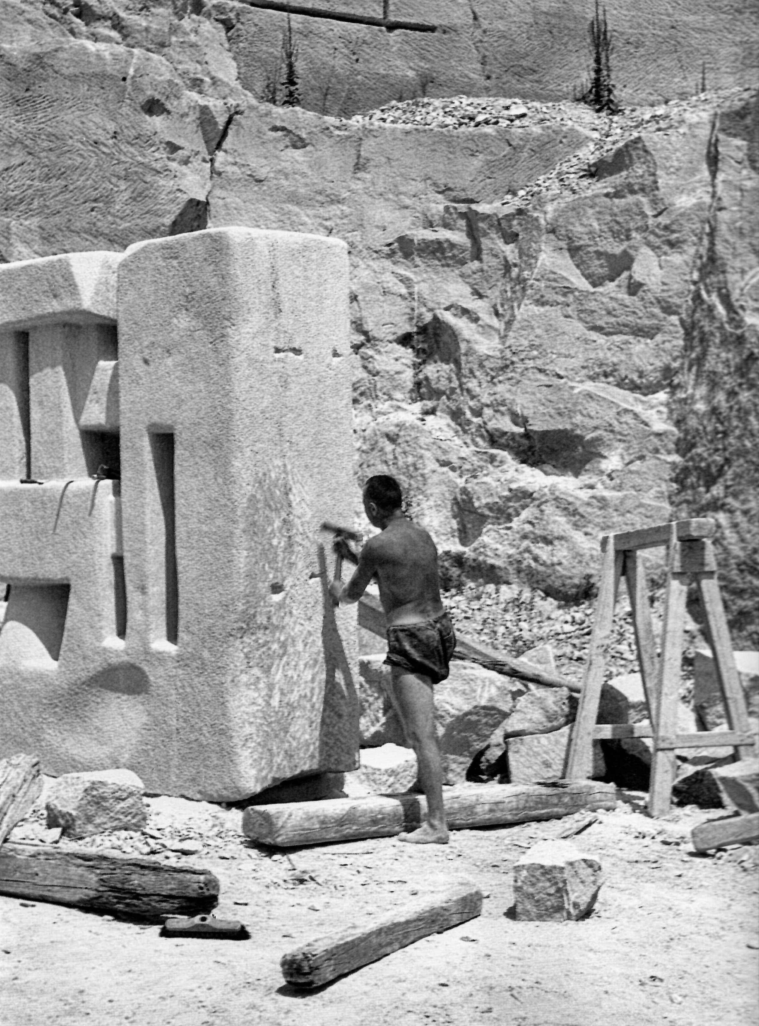 Karl Prantl arbeitet am Grenzstein